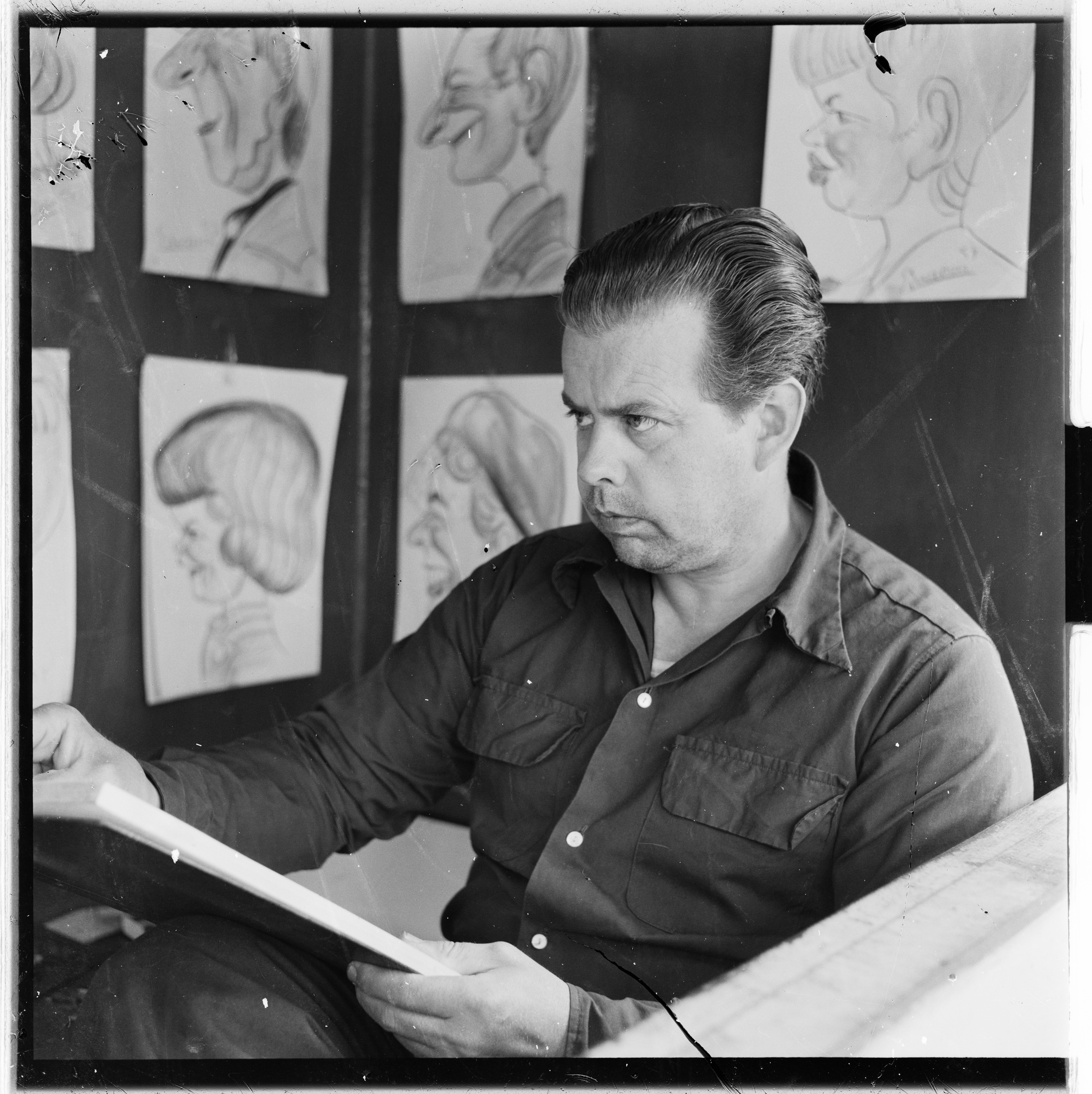 Bildet er hentet fra Arkivverket. Karikaturtegner og kunstner Odd Einarson. Arkivinstitusjon : Riksarkivet Arkivnavn : Billedbladet NÅ Sted : Norge, Ukjent, Ukjent, Emneord: Kunstnere, Karikaturtegnere, Menn Avbildet: Einarson, Odd